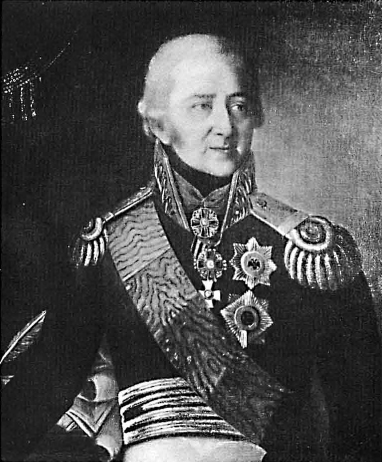 Тутолмин Т.И.